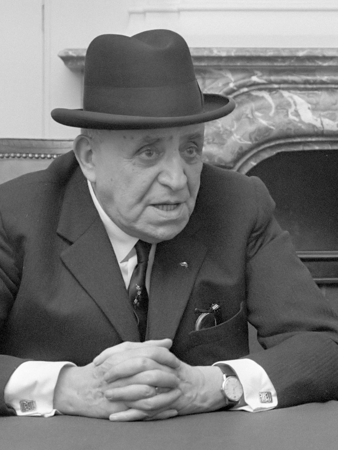 Demonstratieve bijeenkomst in de Portugees-Israëlitische synagoge in Amsterdam uit solidariteit met Joden in Rusland. Brits parlementariër Barnett Janner (l) en de joodse mensenrechtenactivist Simon Wiesenthal